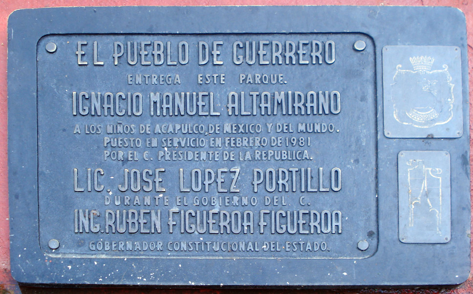 Placa de inauguración del Parque Papagayo, en Acapulco, Guerrero, México.